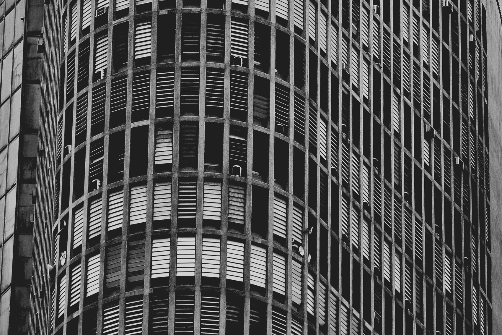 Edifício Itália, São Paulo, SP, Brasil